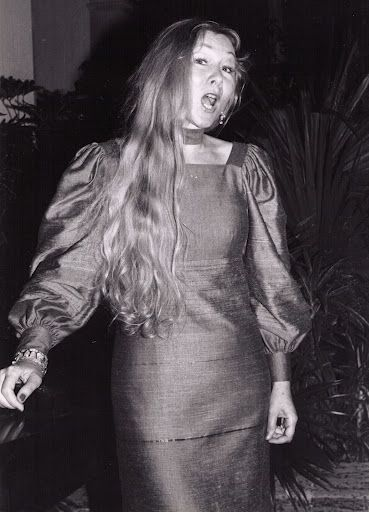 Ortrun Wenkel bei einem Konzert mit den „Wesendonc​k-Liedern“ beim Wagner-Fes​tival in Miami, Florida (VIZCAYA Biscayne Bay)